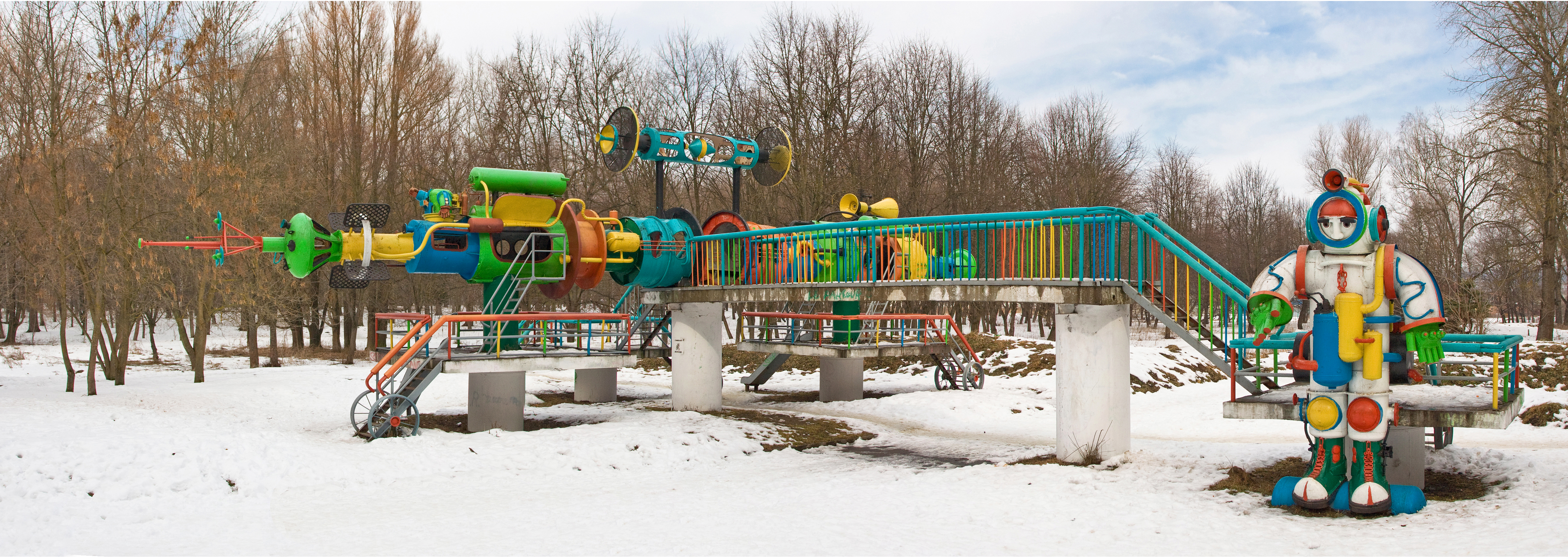 Парк ім.. М. Чекмана, м. Хмельницький по вул. Котовського